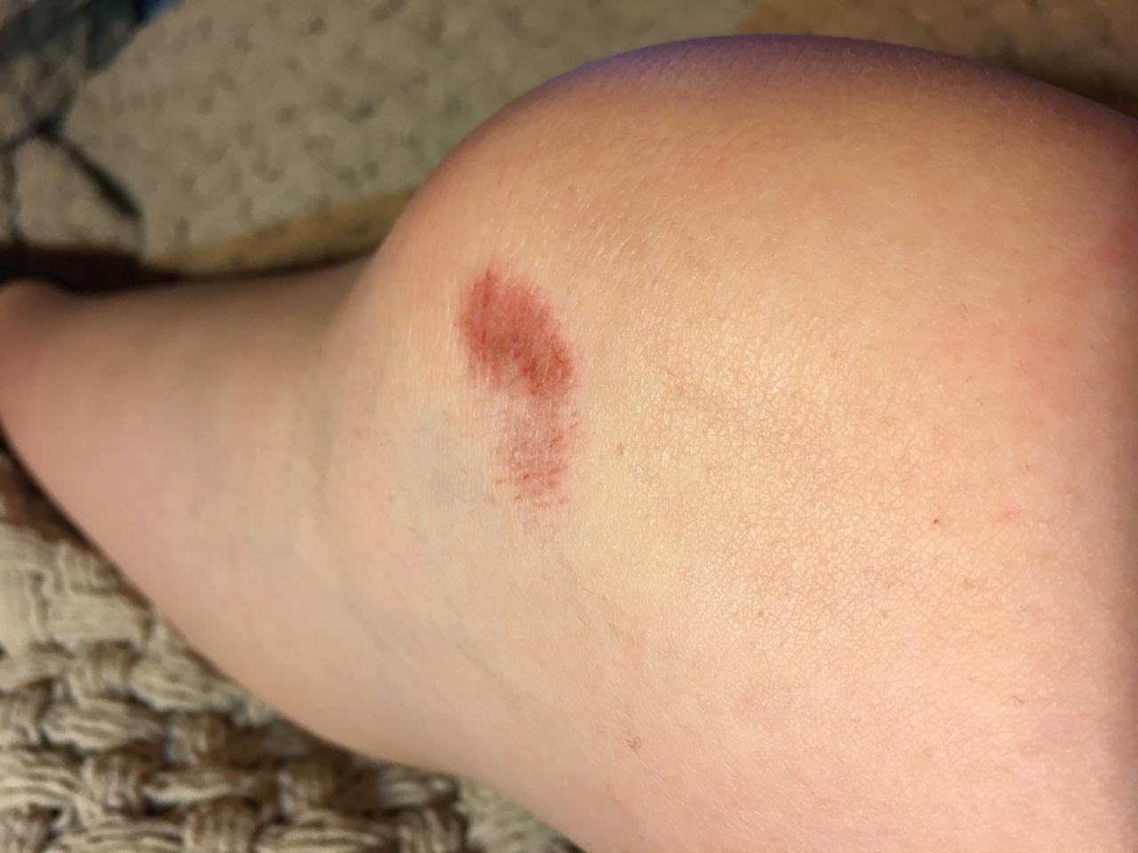 Leve hematoma en rodilla causado por una caída.